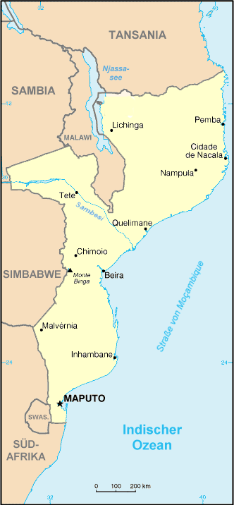 Moçambique-Karte; ins Deutsche übersetzt von Benutzer:Fab